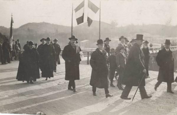 Agordo - Inaugurazione ferrovia Bribano-Agordo - Visita autorità